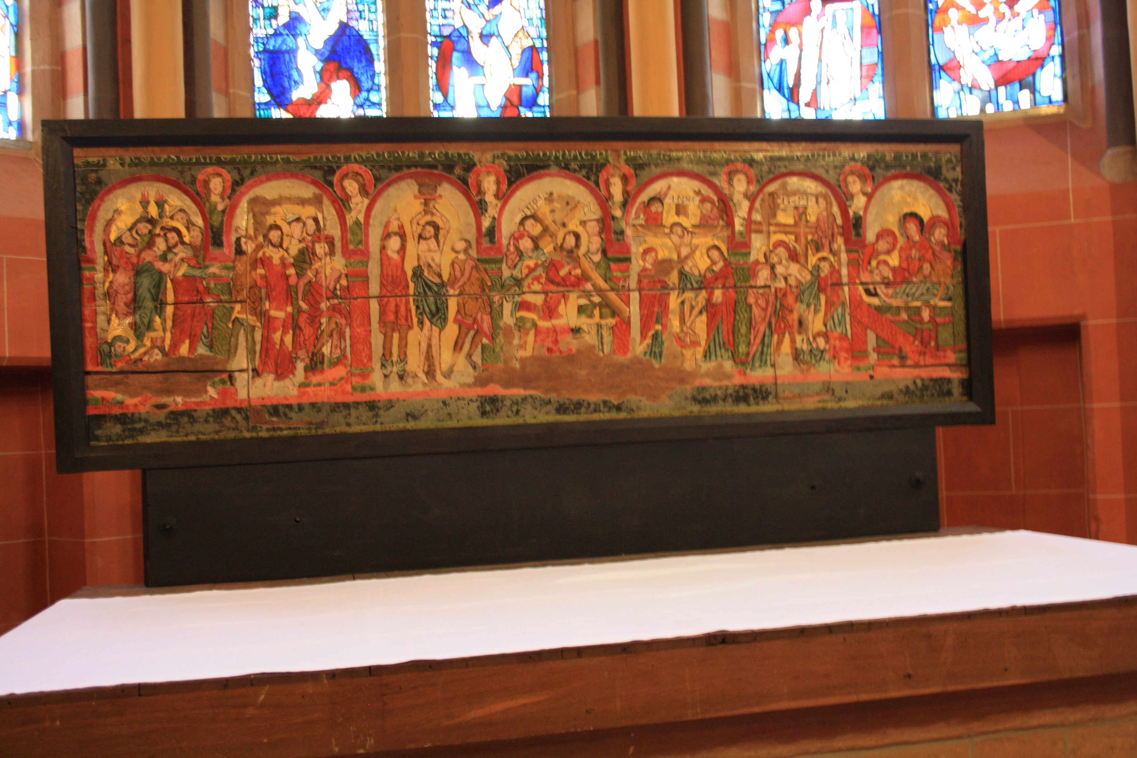 Retabel auf dem Hochaltar der Stiftskirche Wetter (Passion Christi)